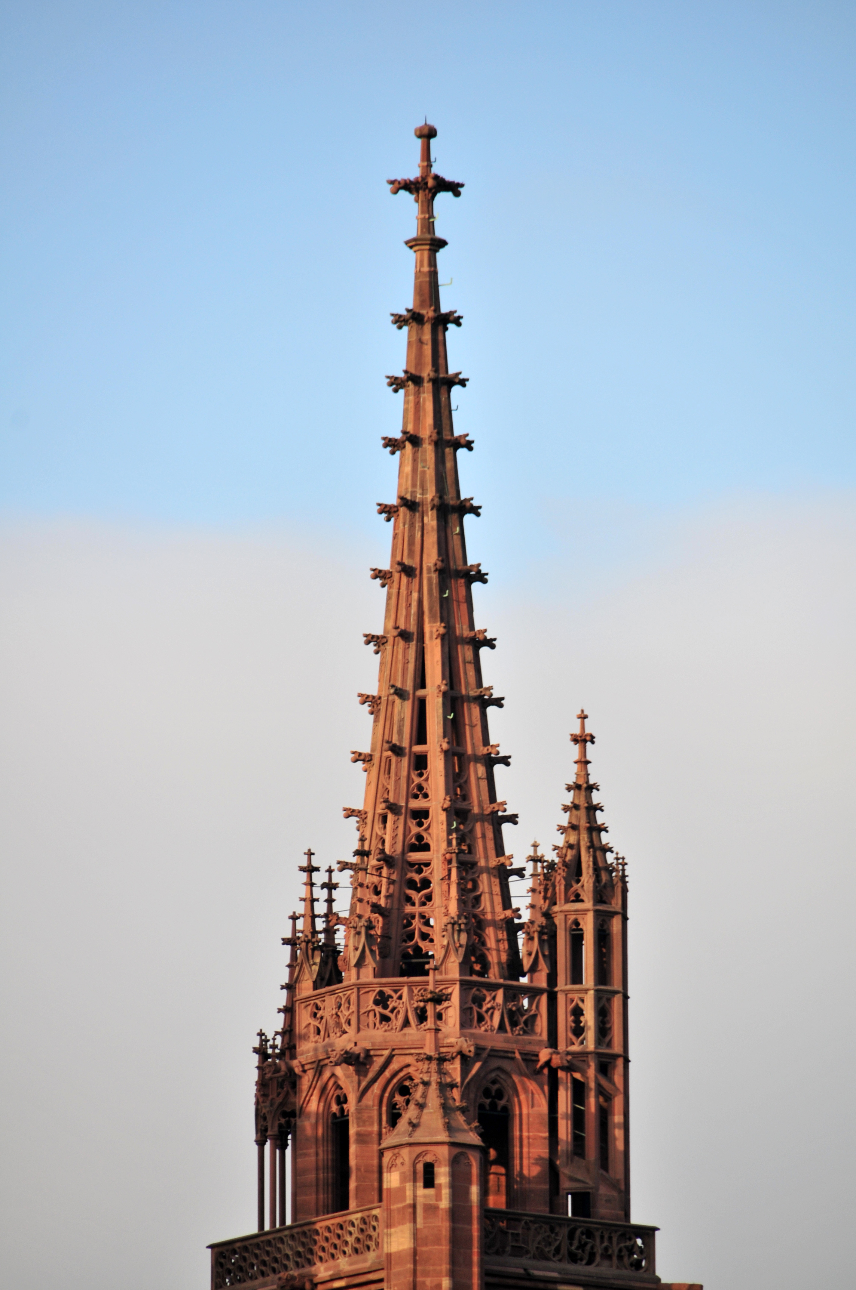 Basel